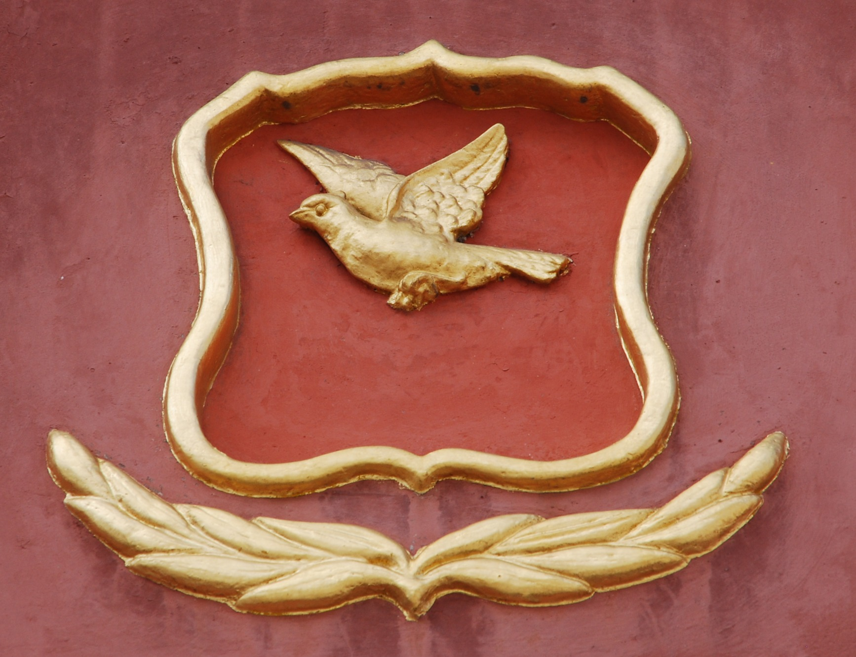 Wappen der Stadt Lörrach: Auffliegende goldene Lerche auf rotem Grund. Auf der Fassade des zweigeschossigen Pfarrhauses aus dem Jahr 1756.